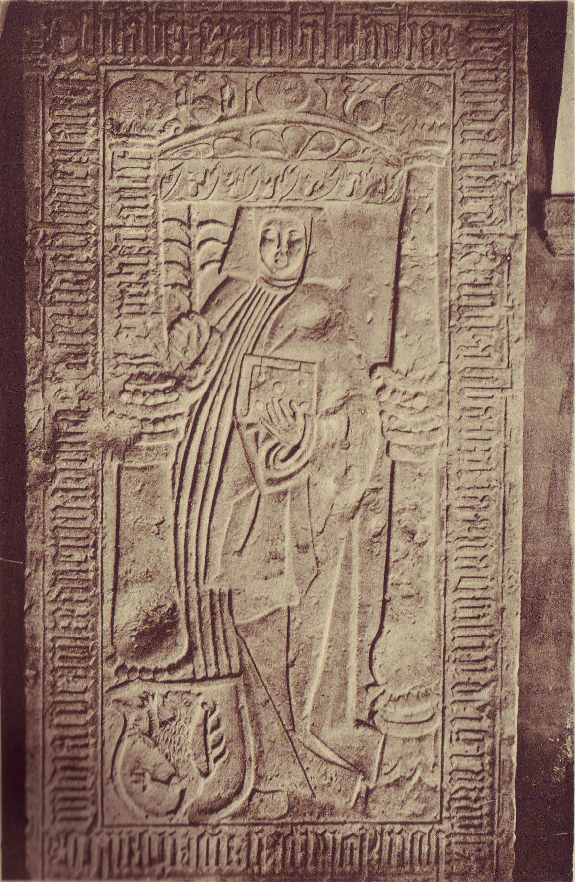 Grabplatte der Elisabeth von Weida (Zur Vergangenheit von Gernrode - Hans Hartung ca. 1912)